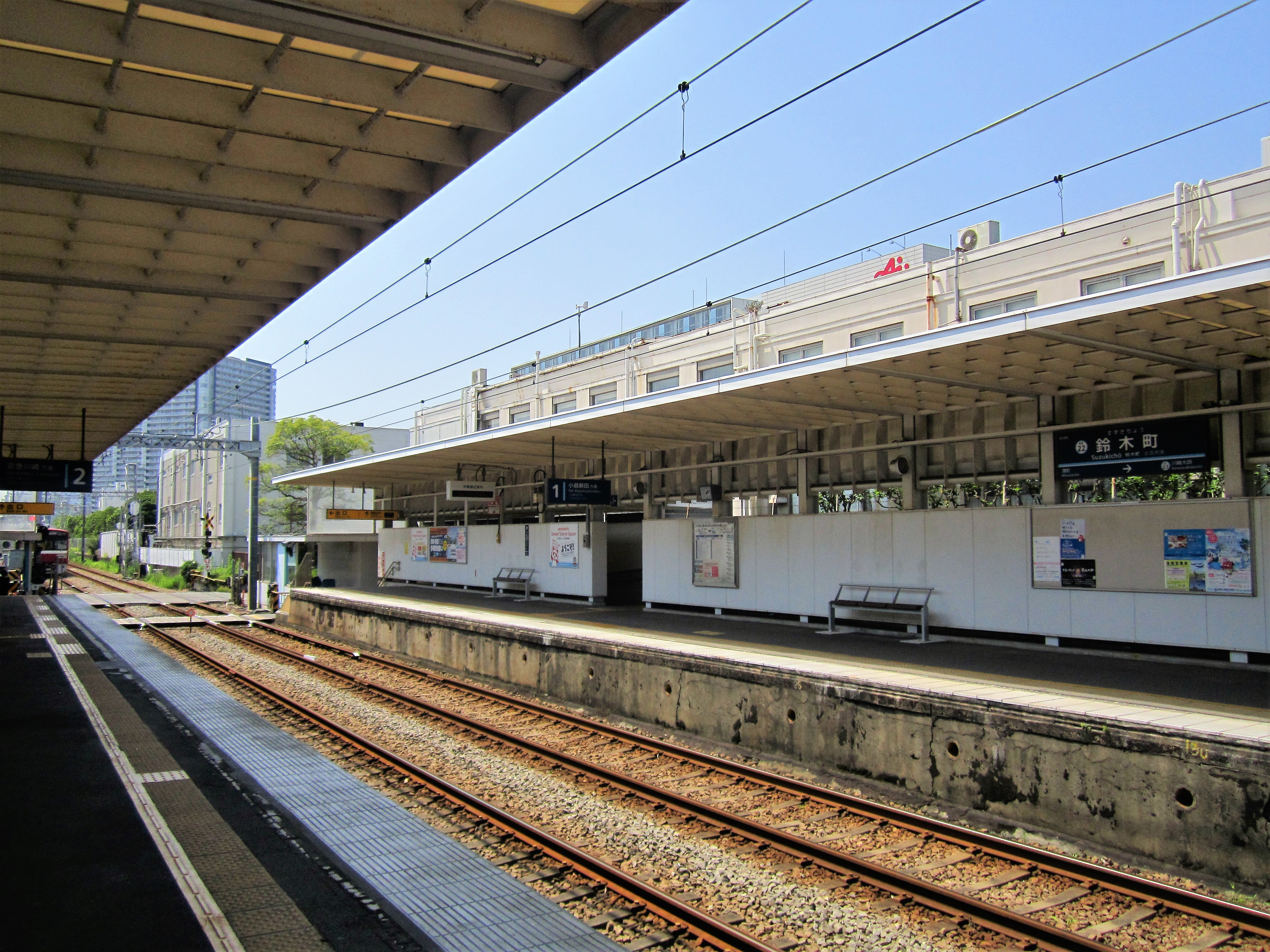 鈴木町駅ホーム